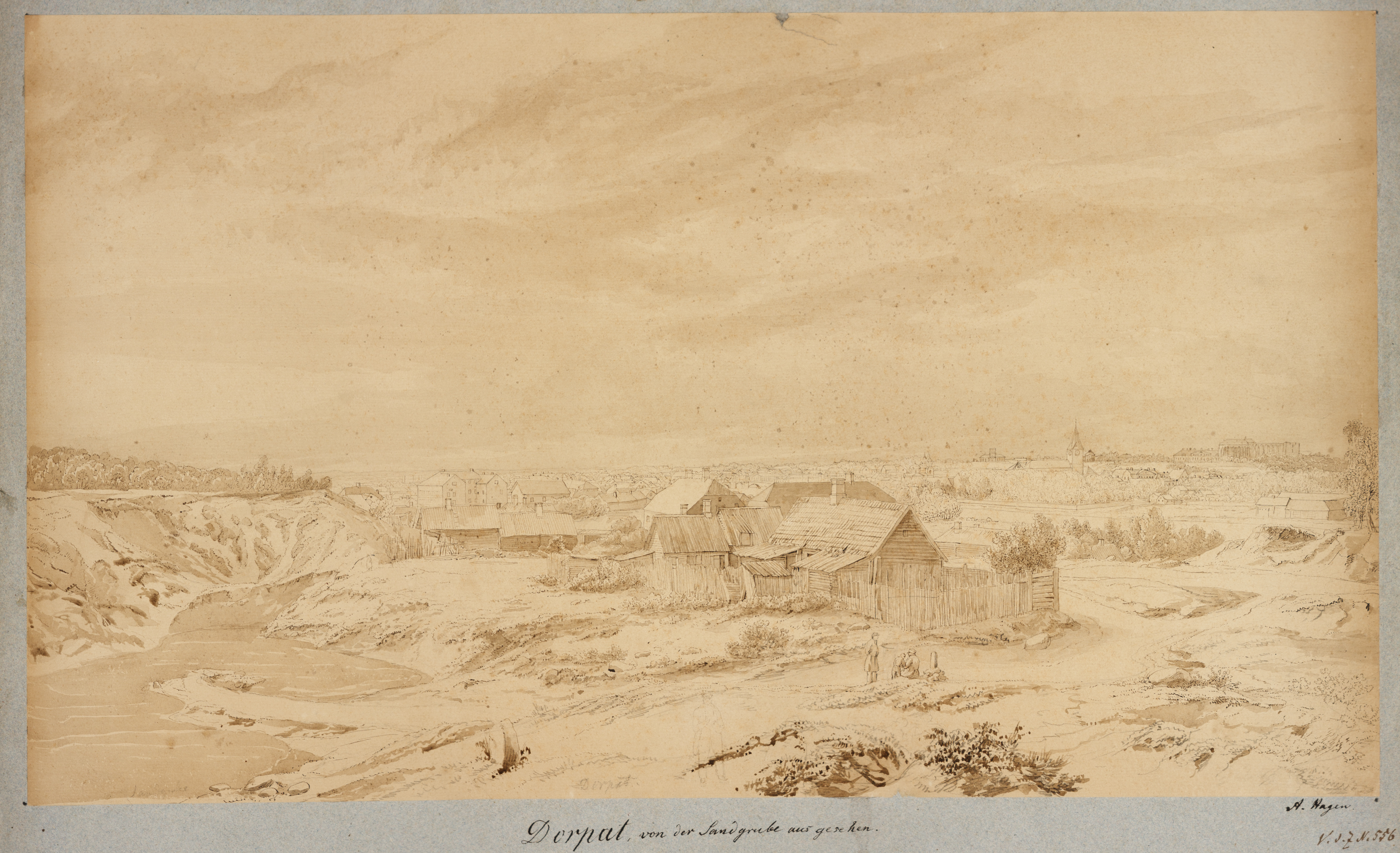 "Vaade Tartule liivaaugust" (ca 1830–1850). Seepia ja pliiats paberil. 31,7 x 54,6 cm. This image on crowdsourcing geotagging platform Ajapaik MUIS:TKM TR 4003 B 1126